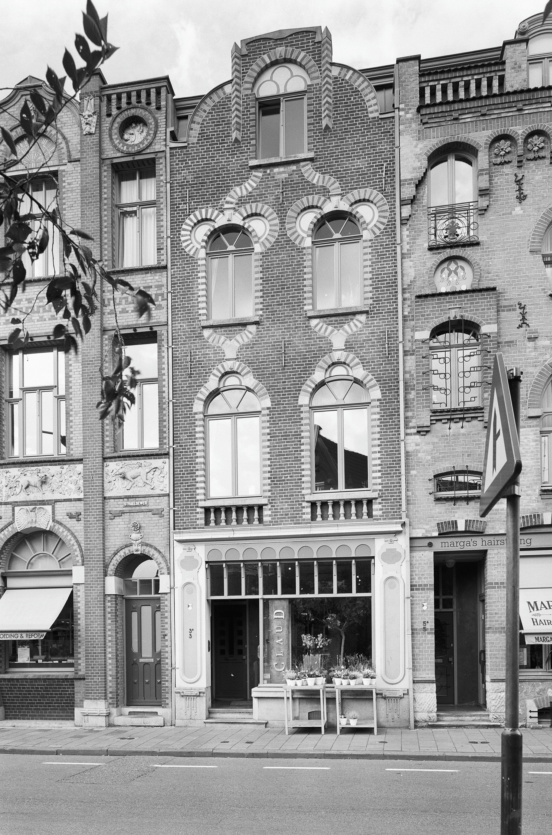 Overzicht voorgevel